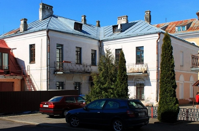 левы флігель Архірэйскага падворка